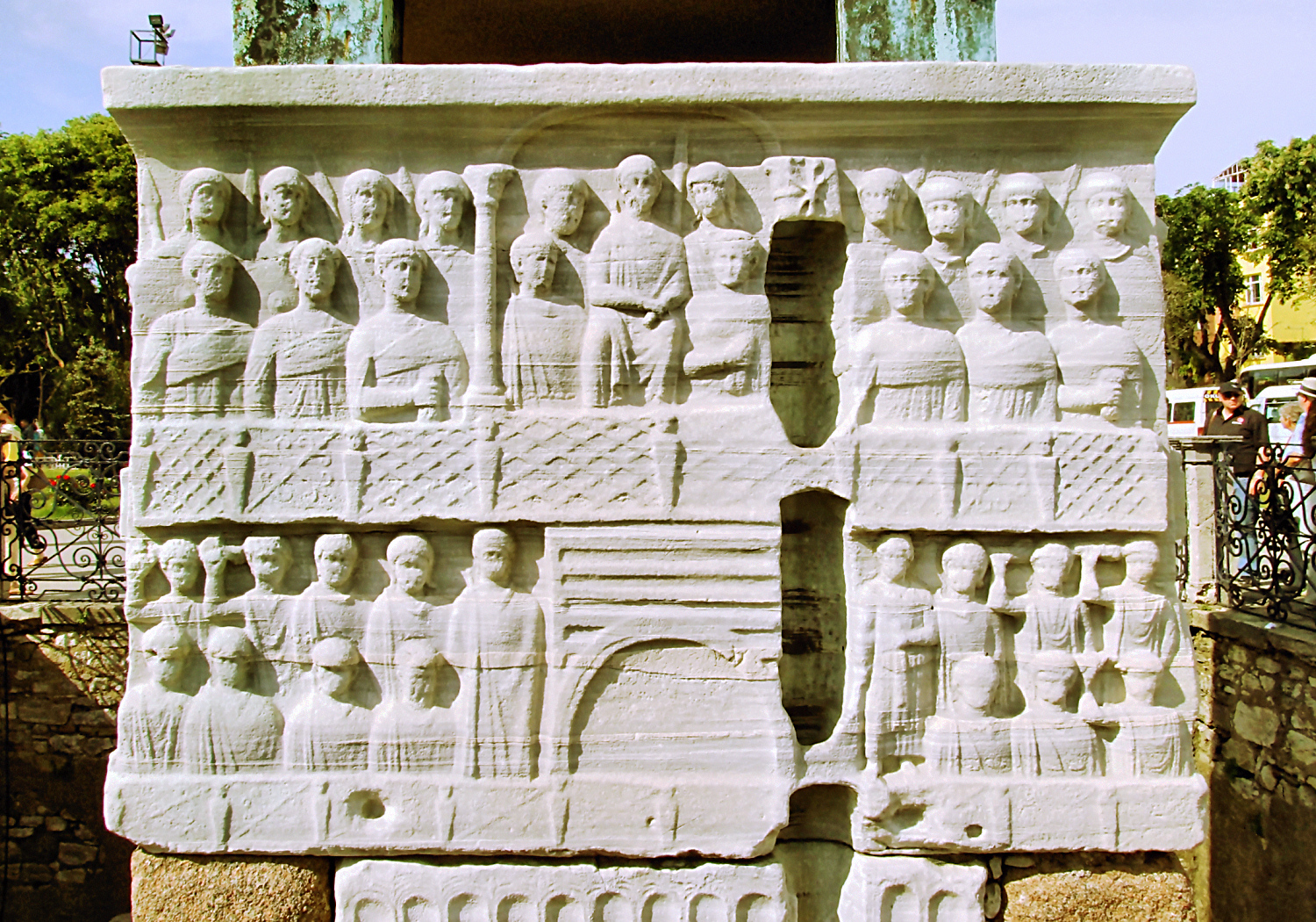 Stambuł, obelisk Teodozjusza na Hipodromie, piedestał; Istambul, Theodosius obelisk in the Hippodrome, pedestal